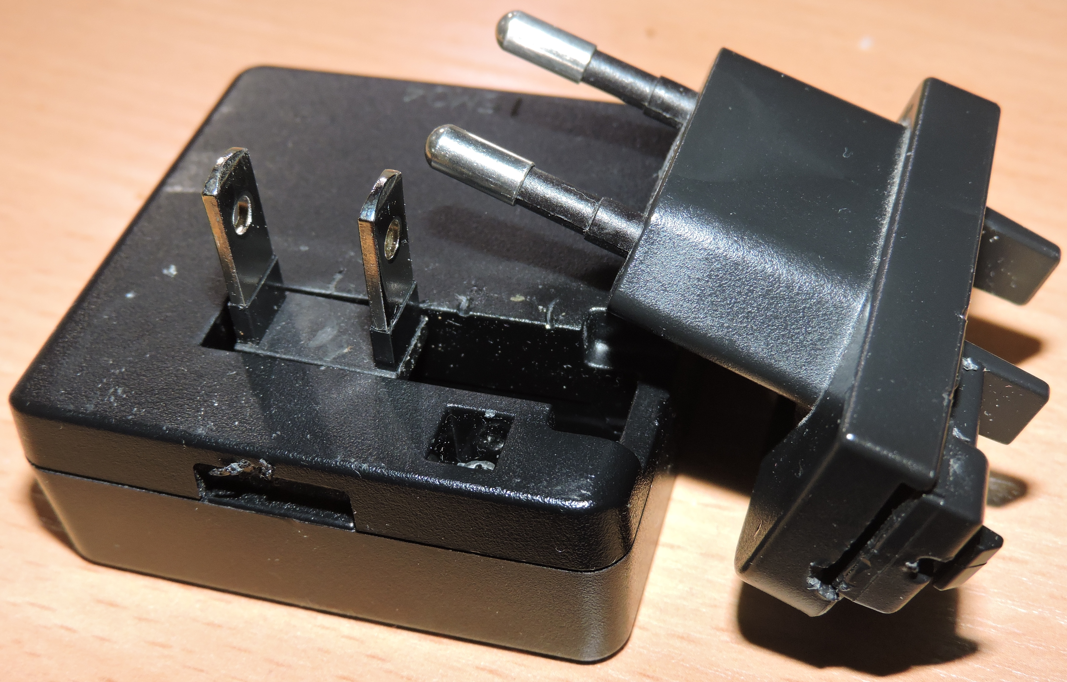 Зарядное устройство Nikon EH-70P со складными штырями типа NEMA 1–15P. К нему прилагается переходник с вилкой типа Europlug